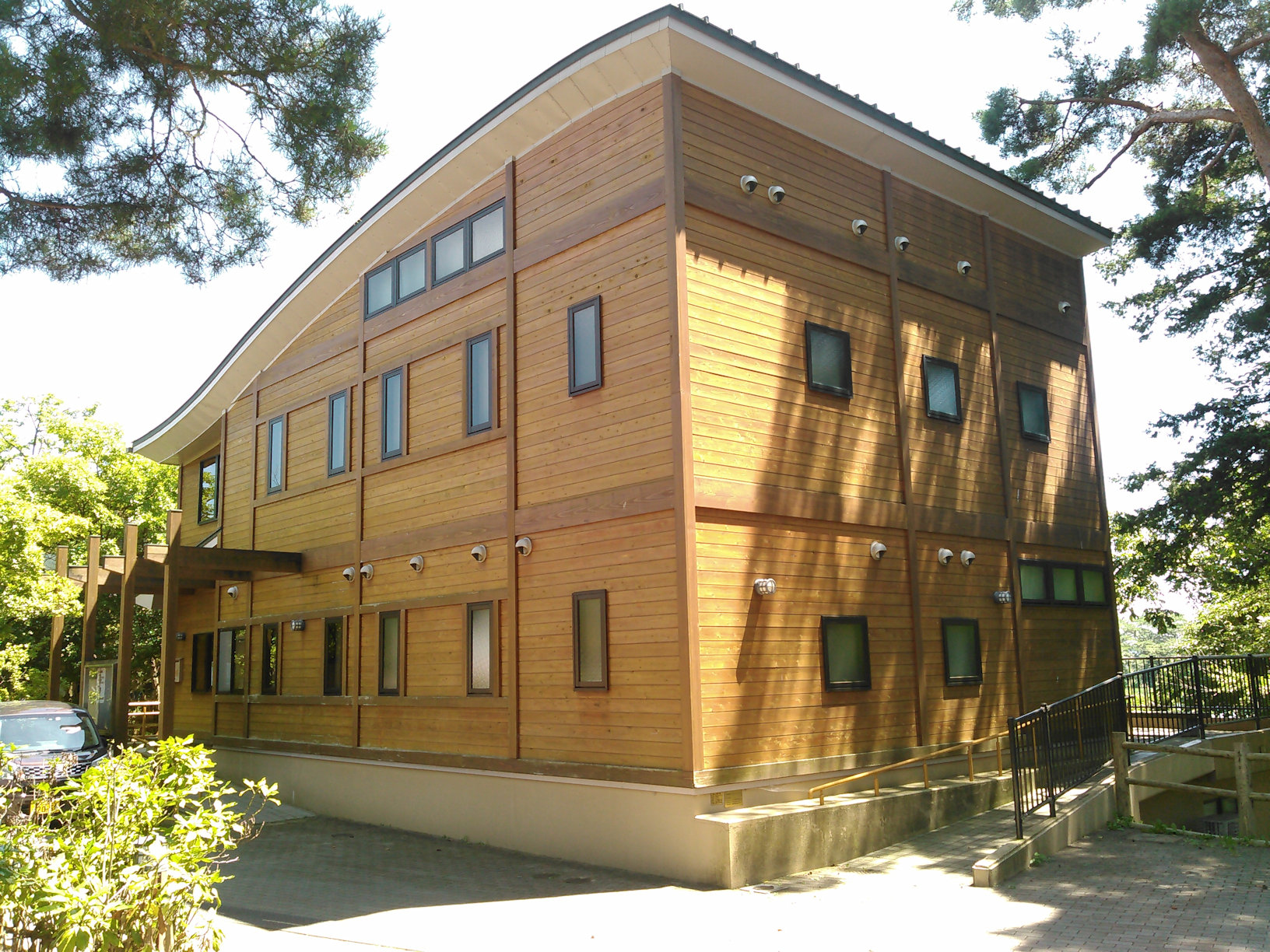 郡山市野鳥の森学習館